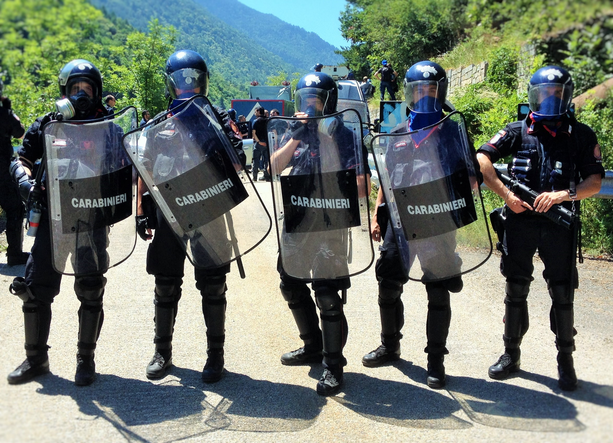 Gruppo quaternario in assetto completo da "ordine pubblico" e lanciatore di artifizi lacrimogeni